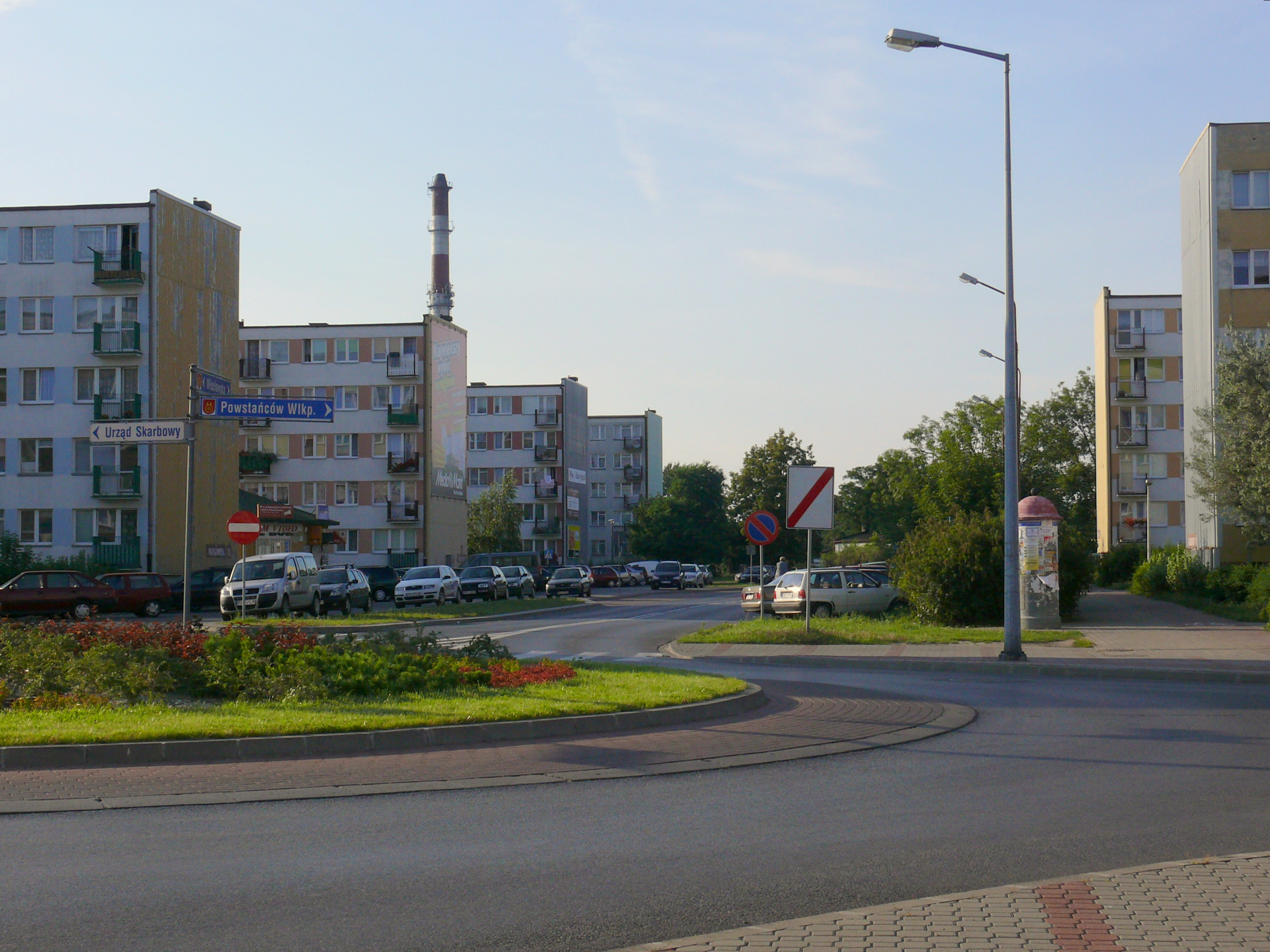 Ulica Włocławska w Kole